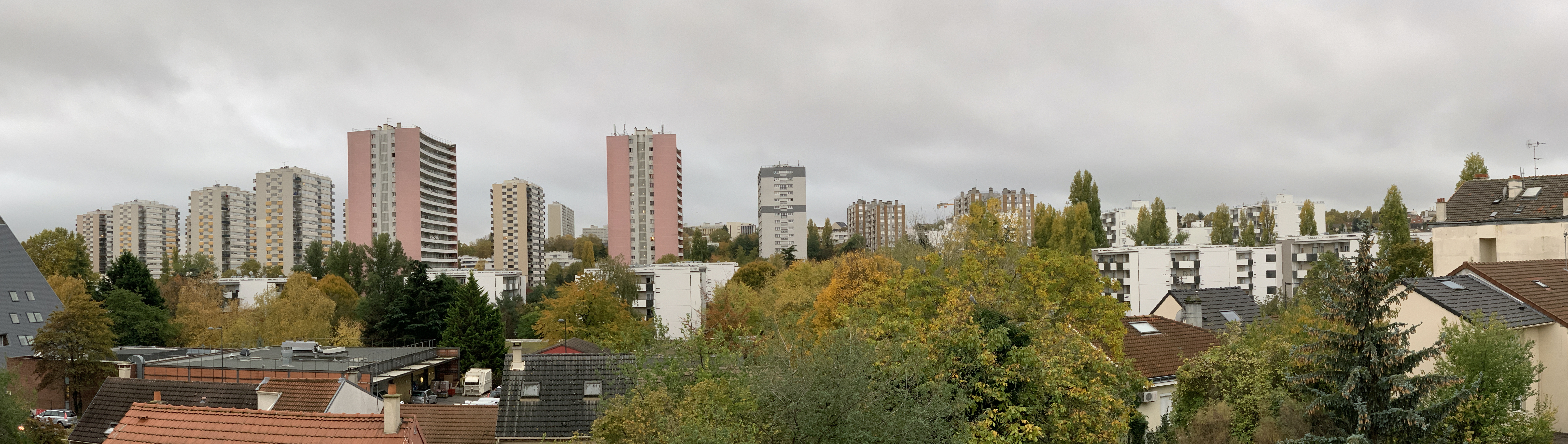 Vue du quartier de Larris depuis l'avenue Victor Hugo, Fontenay-sous-Bois.